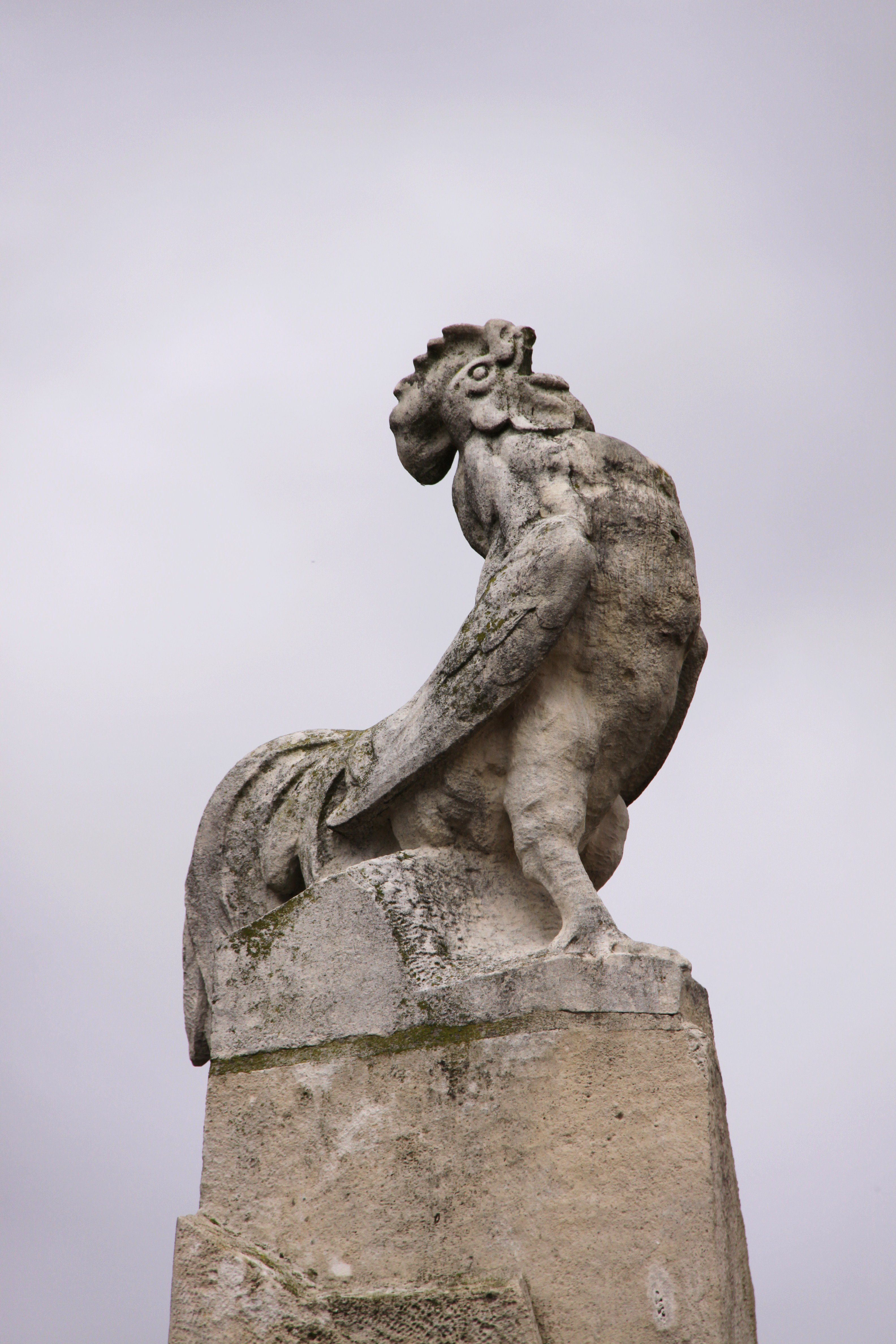 Le Mémorial des soldats et marins de la Charente-Inférieure. Le sommet du mémorial est décoré avec un oiseau gallinacé: un coq gaulois triomphant, le poitrail bombé. Ce monument commémoratif a été édifié en 1913 par le Souvenir Français (association patriotique) et la Ville de La Rochelle. Il est dédié à la mémoire des militaires de la Charente-Inférieure morts hors du territoire français. Le département de la "Charente-Inférieure" est devenu "Charente Maritime" depuis août 1941. La Rochelle (Square Valin), Charente Maritime, France.